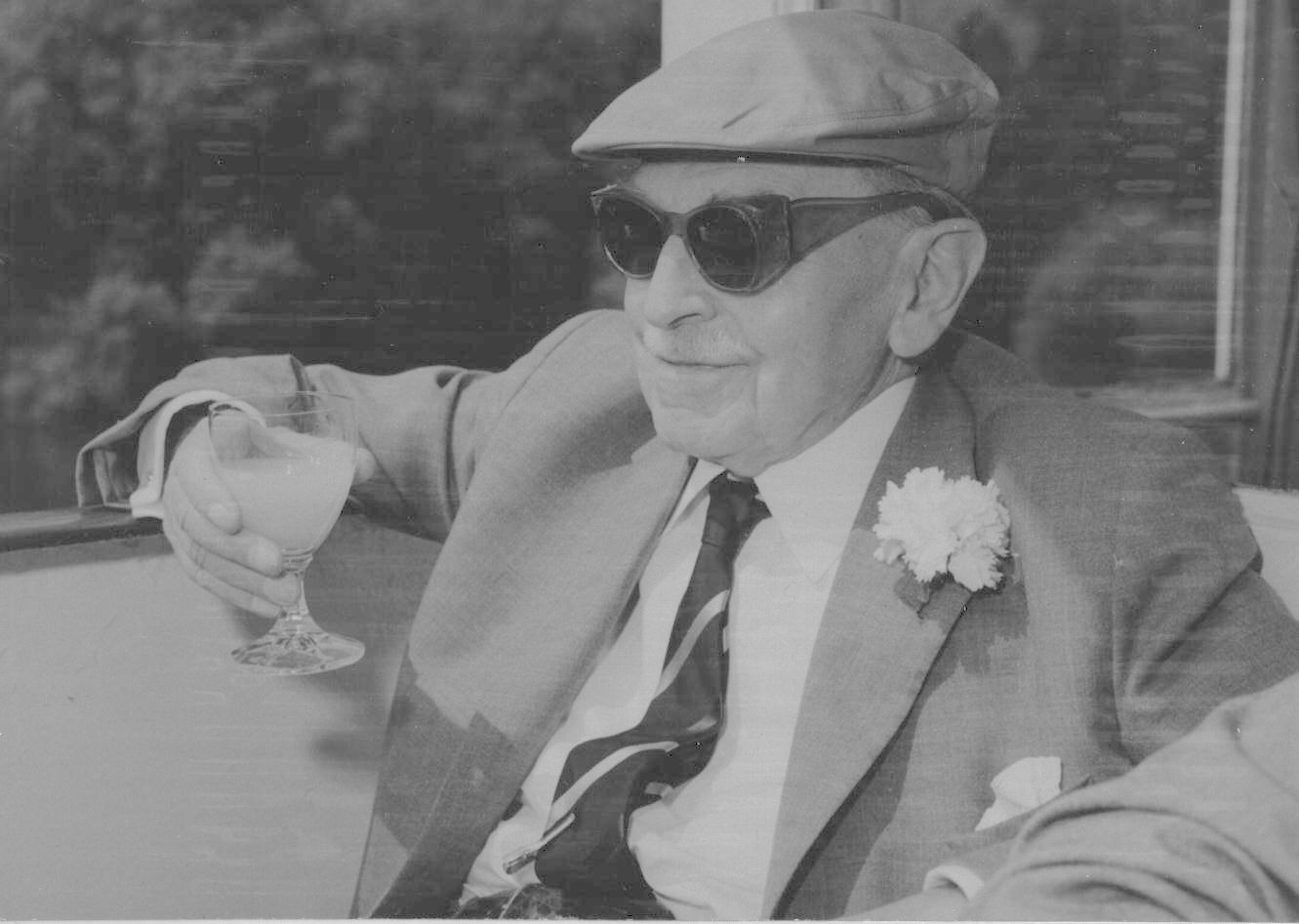 Otto Hahn bei einer Dampferfahrt nach Speyer an Bord MS "Düsseldorf" anläßlich der 16. Hauptversammlung der MPG in Mannheim